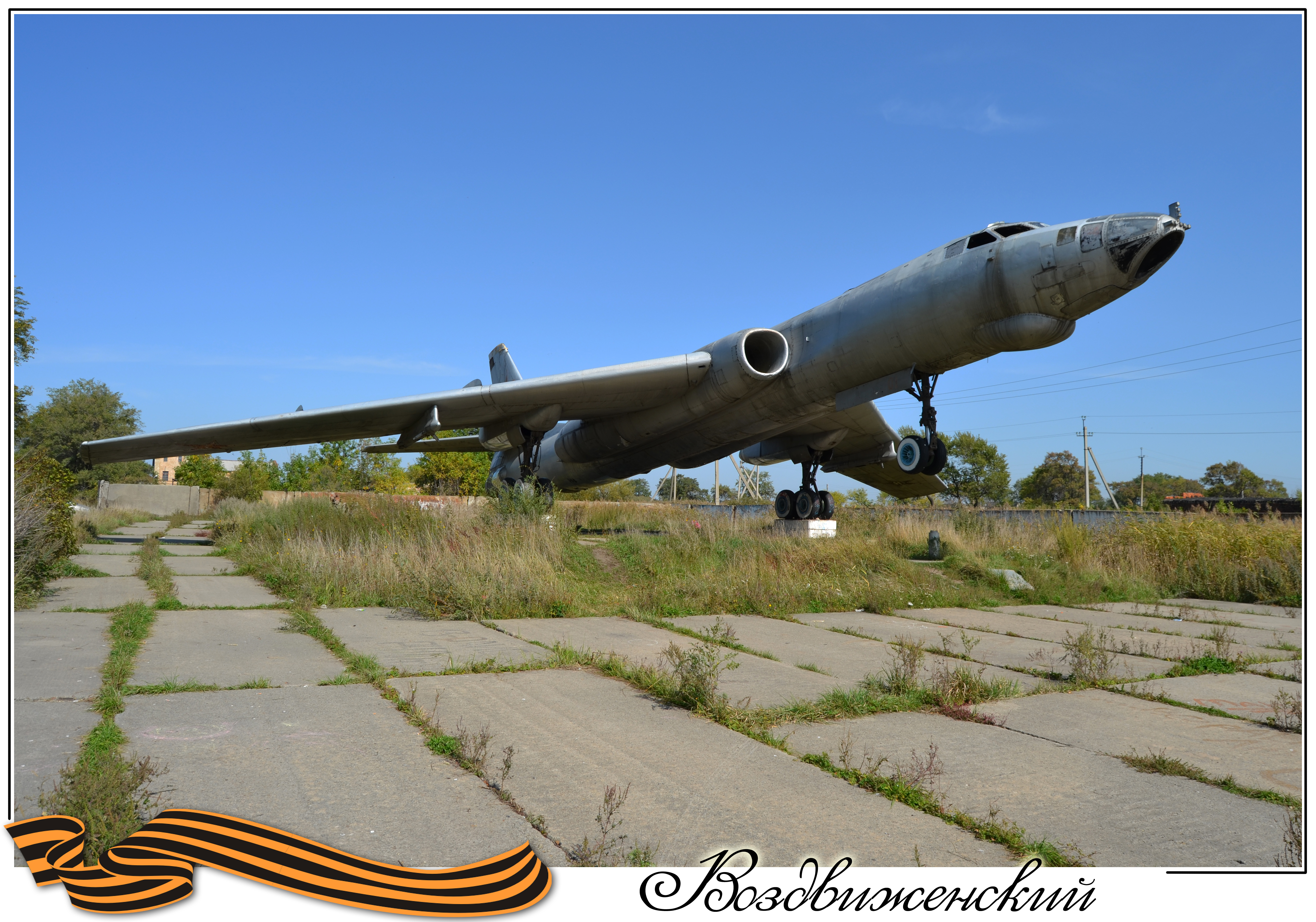 Памятник летчикам дальней авиации.